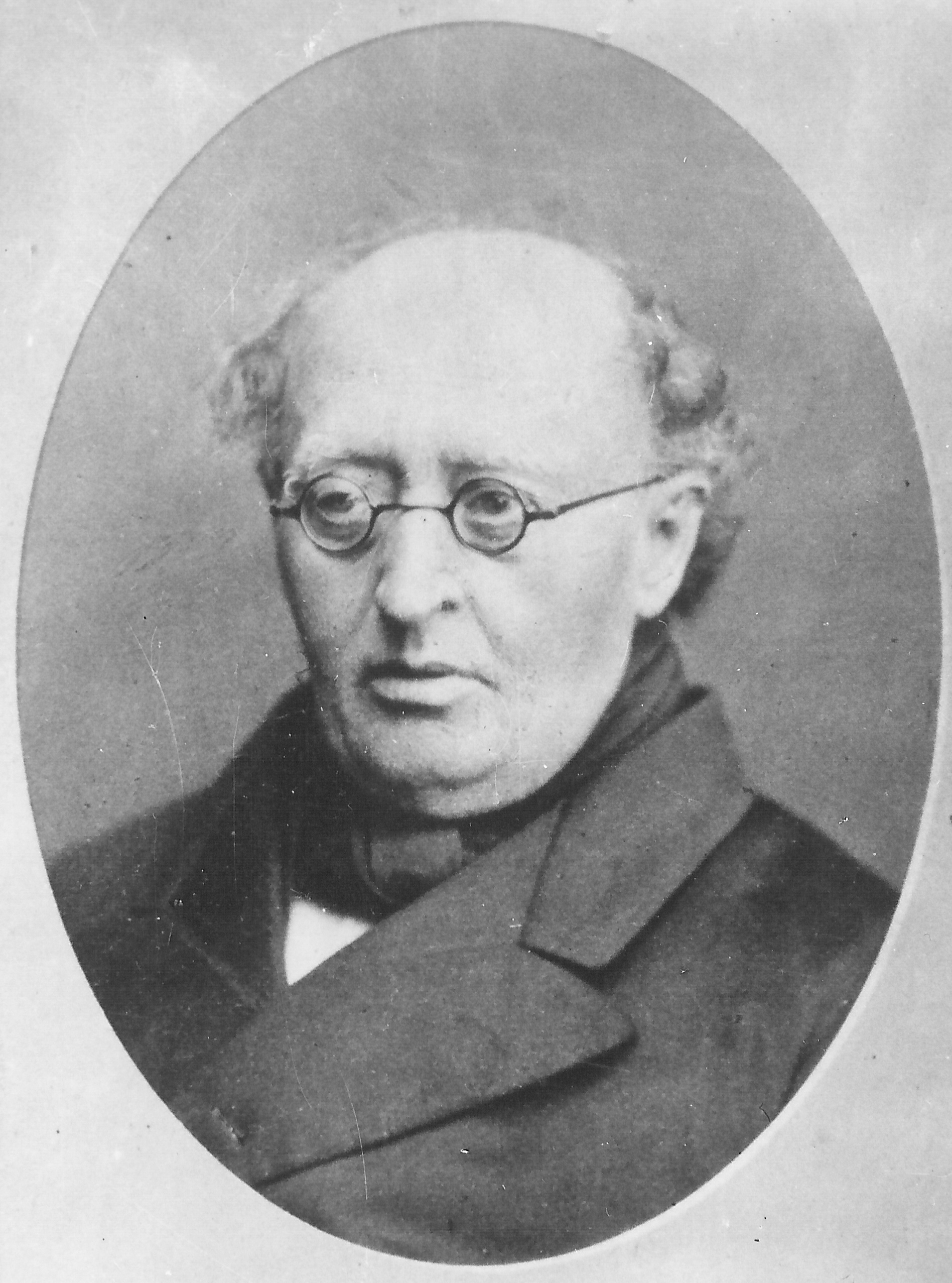 Daniel Ley